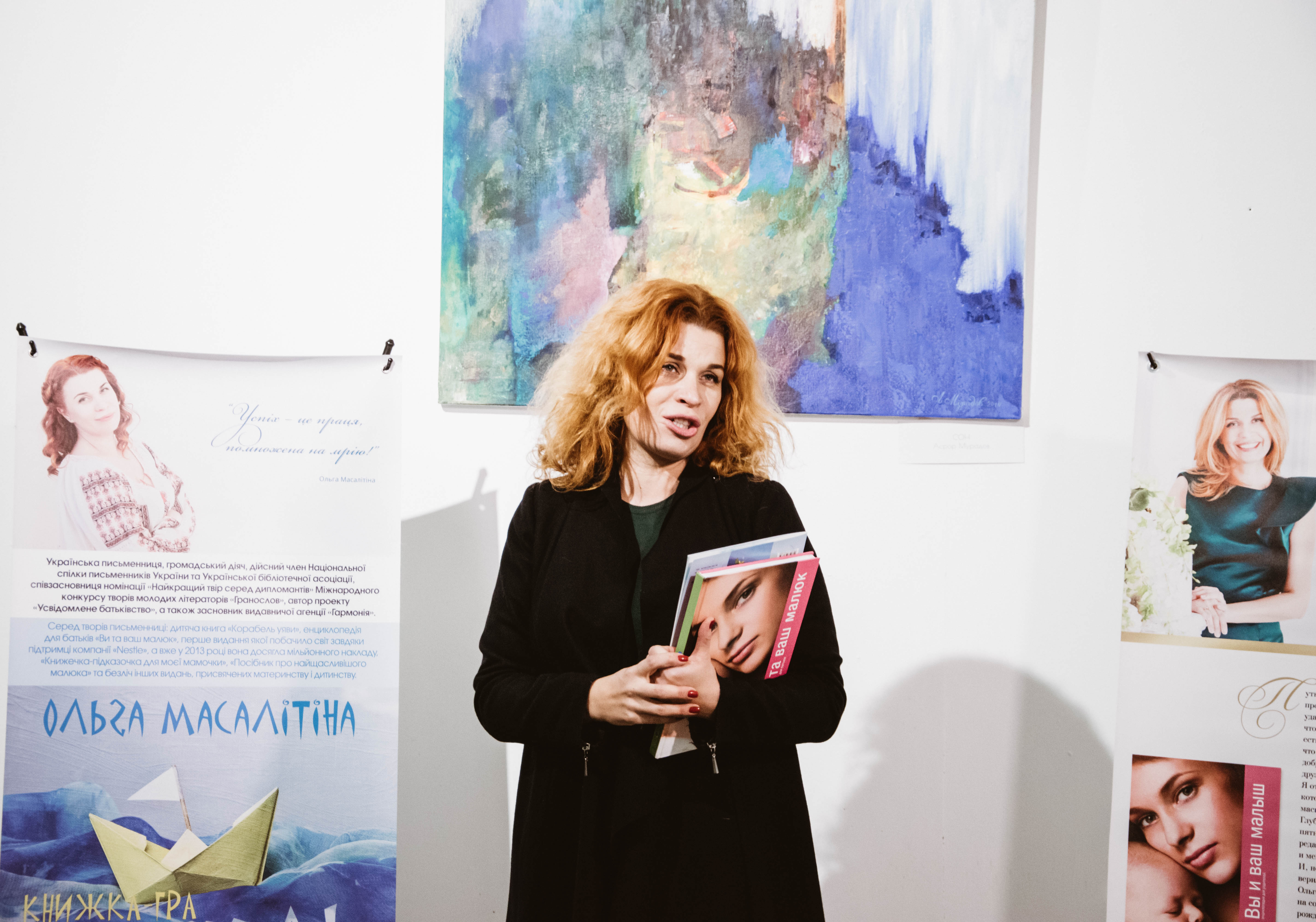 Ольга Масалітіна